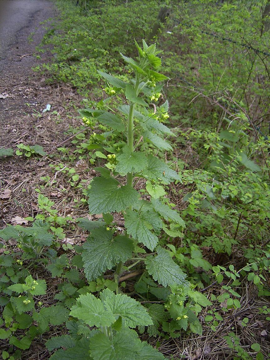 Scheveningse duinen, 24 april 2004